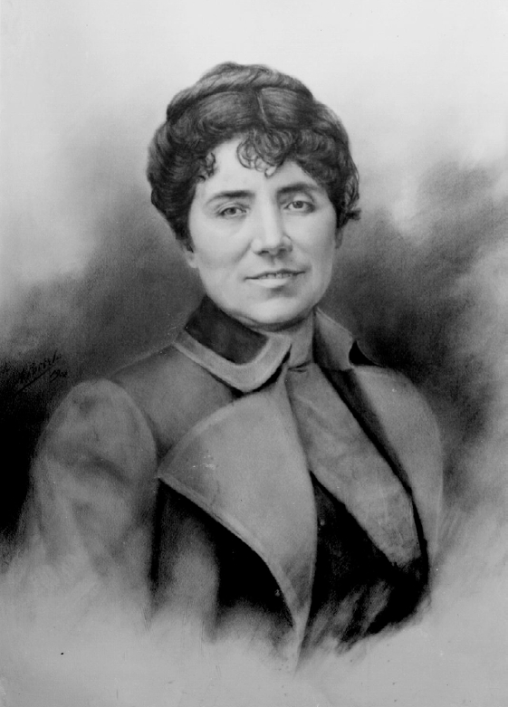 Debuxo póstumo de Rosalía de Castro (1837-1885).